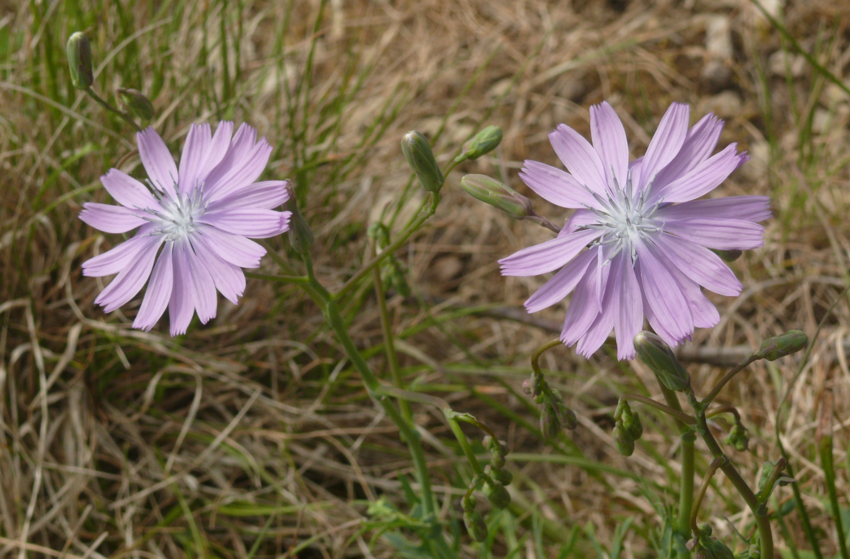 Lactuca perennis, Hohenlohe, Deutschland